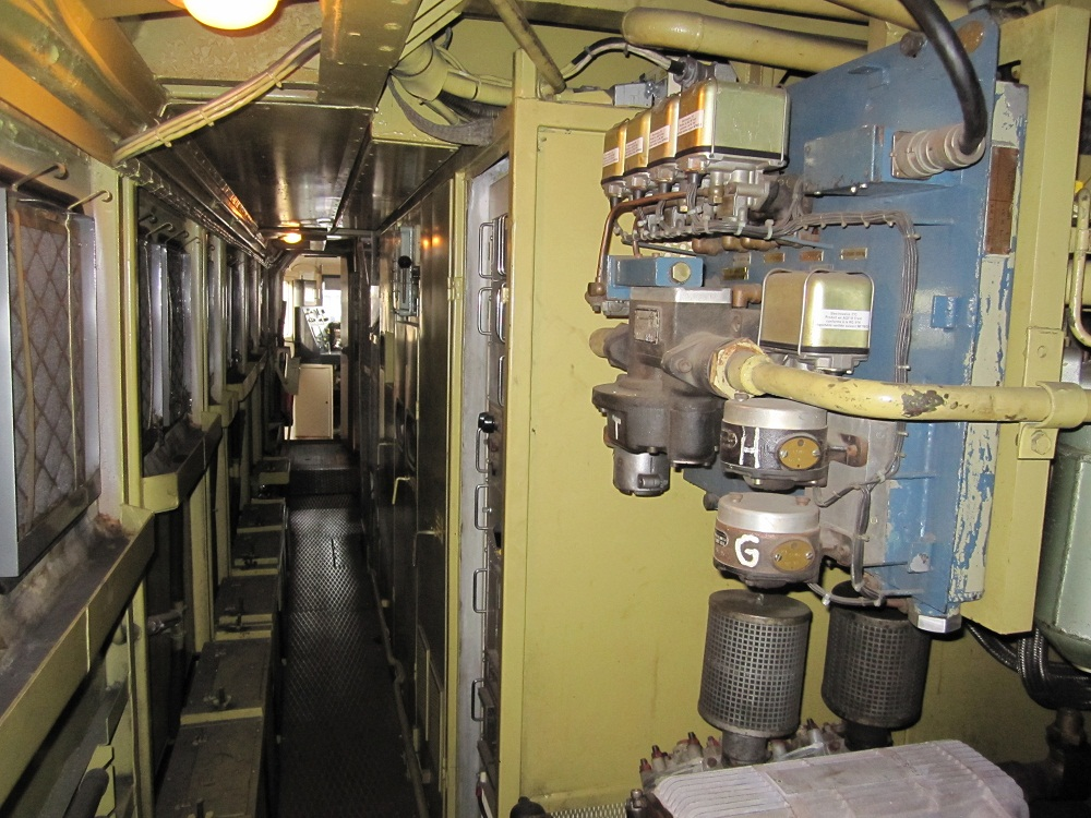 Compartiment moteur d'une BB 17000, Villetaneuse, France.